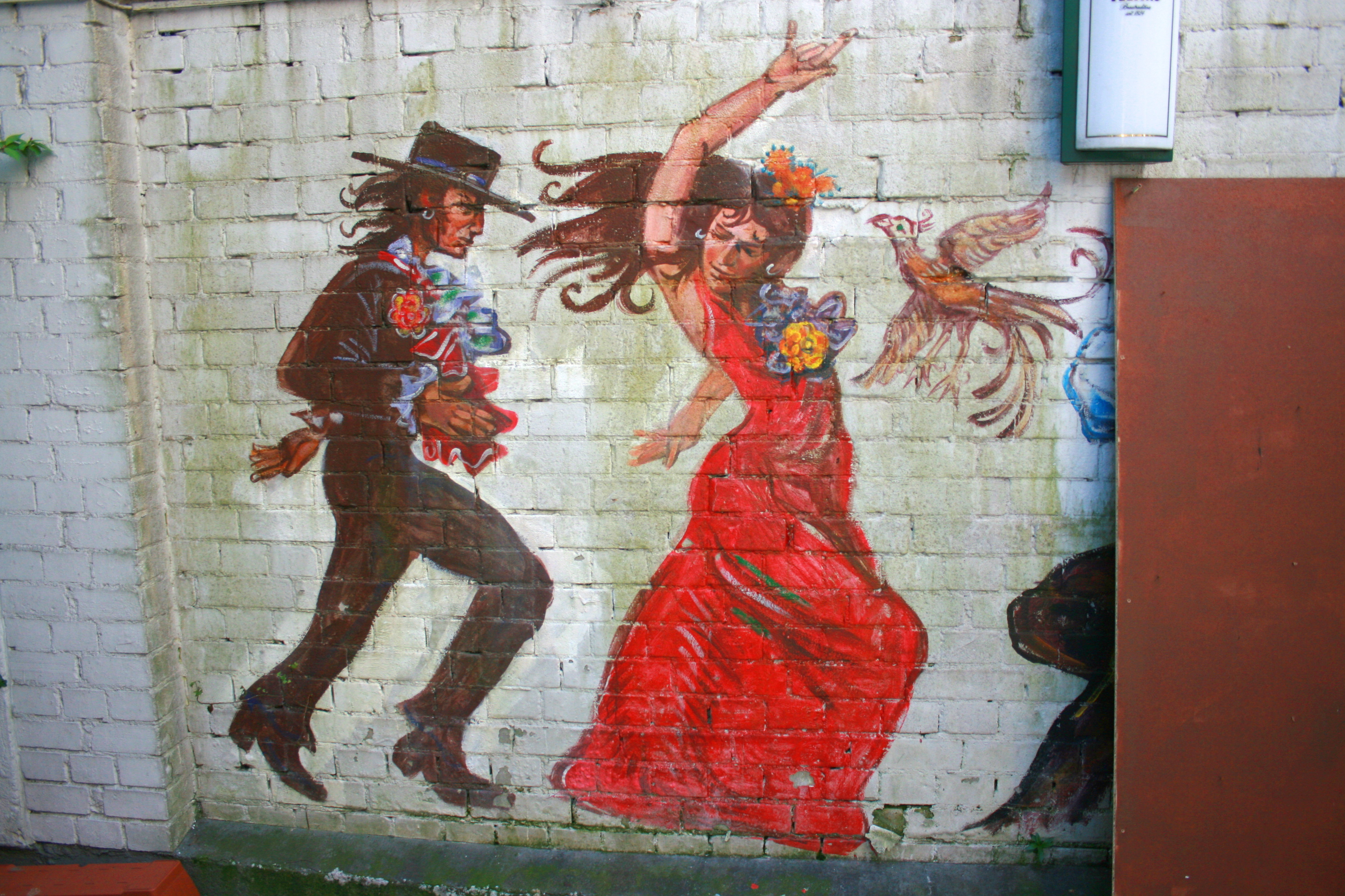 Aue in Wuppertal